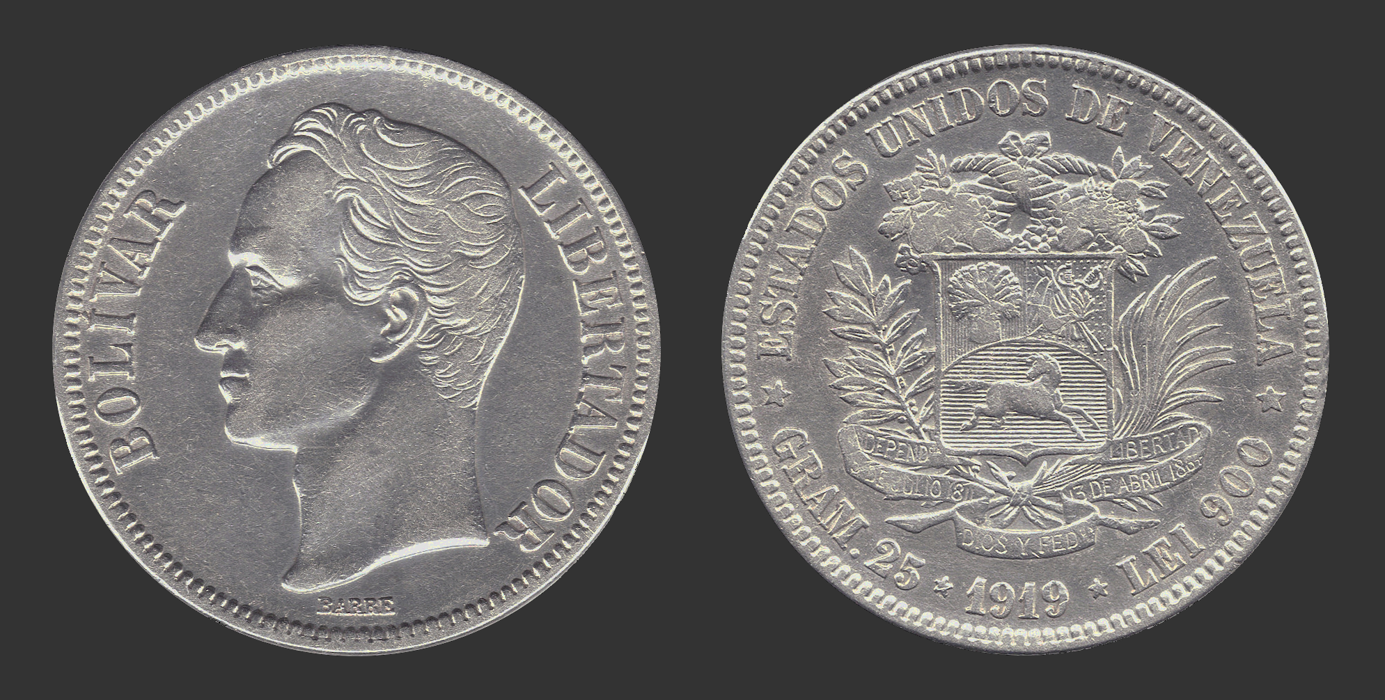 Moneda venezolana de 5 Bolívares de plata, llamada popularmente Fuerte, derivado a su valor 1 Peso Fuerte; de fecha 1919. Esta denominación es equivalente en valor a 1 Venezolano, 1 Peso Fuerte, 1,25 Pesos y 10 Reales (de la unidad monetaria Peso Fuerte) Fecha: 1919 General: Forma circular, canto estríado contínuo. Anverso (izq): Ribete circular, gráfila dentada. En el centro, sobre el campo, efigie de Simón Bolívar mirando a la izquierda con "BARRE" (del grabador original Barre) en su base, circulada con "BOLÍVAR" a la izquierda y "LIBERTADOR" a la derecha. Reverso (der): Ribete circular, gráfila dentada. En el centro, sobre el campo, Escudo Nacional con las leyendas "INDEPENDENcia", "LIBERTAD", "5 DE JULIO DE 1811", "13 DE ABRIL DE 1864" y "DIOS Y FEDcion". A lo largo del borde la leyenda "ESTADOS UNIDOS DE VENEZUELA", el peso "GRAM.25", el año y la pureza metálica "LEI 900". Similitudes del diseño del reverso: El diseño es similar al Diseño A, Tipo A, variando en el cambio de una de las cintas a "13 de Abril de 1864" en el Escudo Nacional. Observaciones: Existe discrepancia en la precisión de la cantidad de acuñaciones ocurridas en 1903.